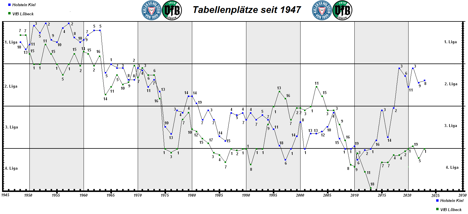 Platzierungen von Holstein Kiel und VfB Lübeck seit 1947